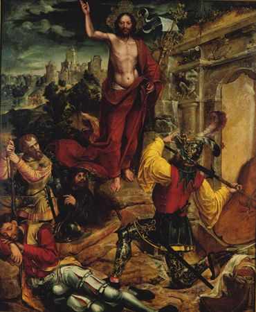 De acordo com uma nota escrita pelo Dr. José de Figueiredo no Livro 1º da Entrada de Correspondência, os seis quadros que formam o retábulo dito de Santos-o-Novo, estavam no coro de baixo da igreja do respectivo mosteiro no ano de 1911, data da entrada do conjunto no Museu das Janelas Verdes. Passa-se a transcrever parcialmente o documento citado (fl.6): "Em 22 do corrente (Agosto de 1911) esteve o Director do Museu no Recolhimento de Santos-o-Novo a receber vários objectos ali existentes, em virtude do despacho do Ex.mo Ministro da Justiça. Esses objectos, entregues ao Director na presença de dois vogais da Comissão Jurisdicional das Extintas Congregações, são: 6 quadros de madeira do século XVI escola de Lisboa, representando respectivamente a «Anunciação», «Natividade», «Adoração dos Reis Magos», «Cristo no Horto», «Enterro de Cristo» e «Ressurreição de Cristo» e estavam no coro de baixo da referida Igreja;..." (cf. João Couto, O retábulo quinhentista de Santos-o-Novo, p.13, nota 1).